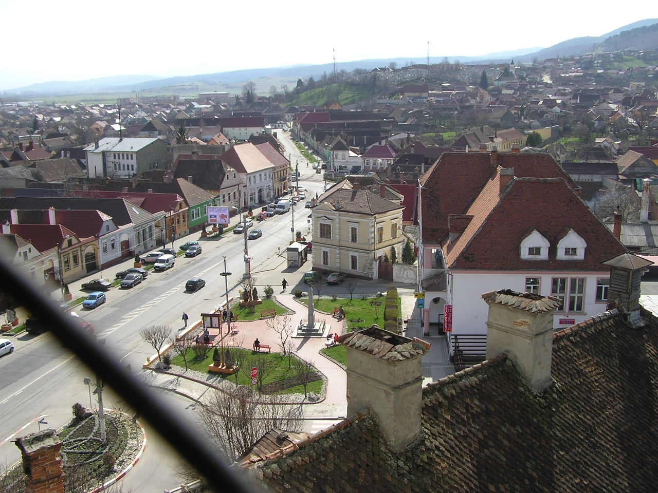 Ansicht auf Codlea / Zeiden in südliche Richtung.